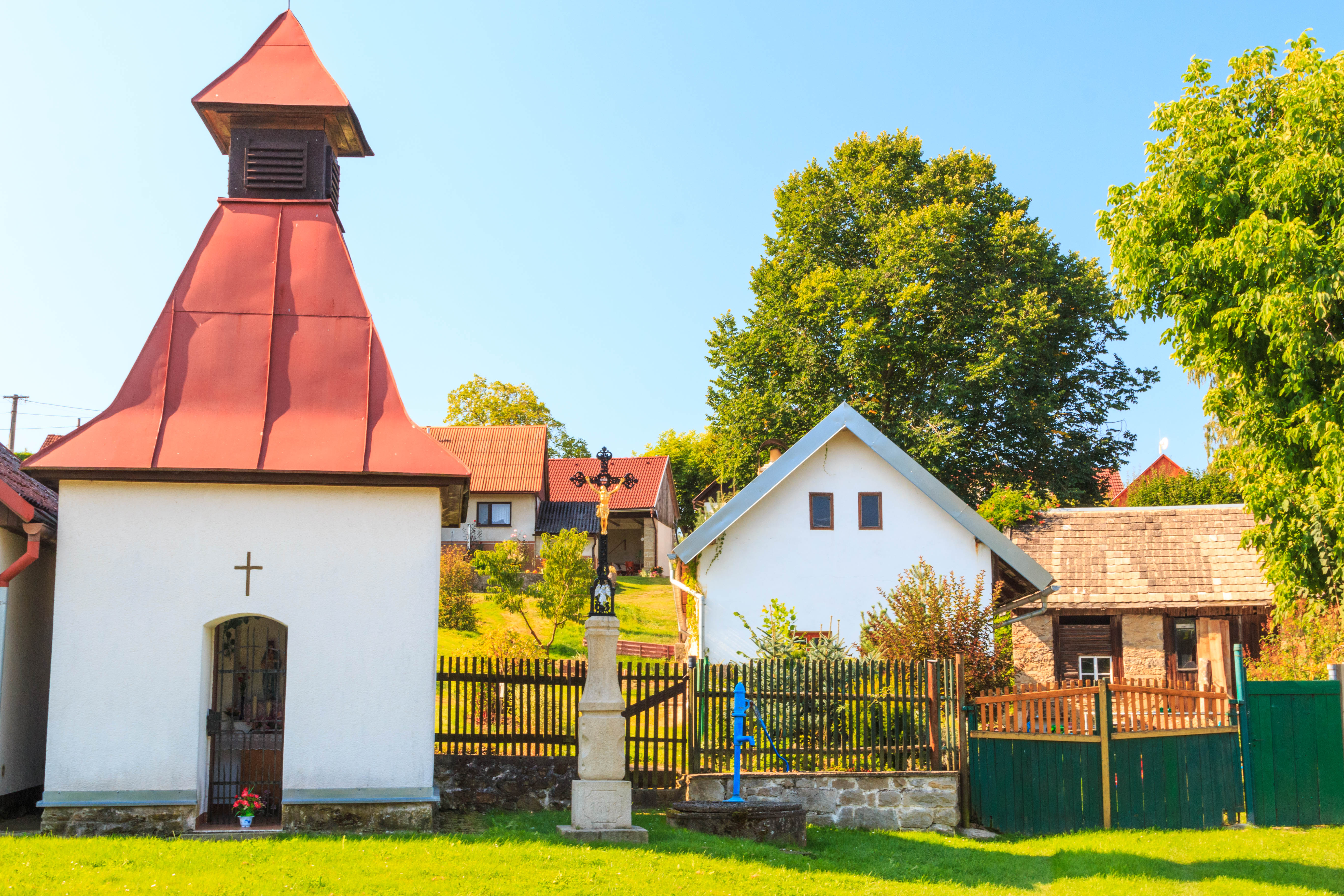 Podivice u Kaliště - kaplička